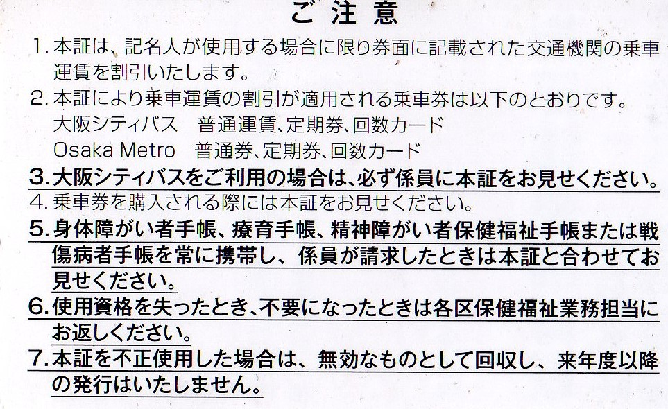 表面のコピーは不正かつ個人情報の塊なので裏面です。